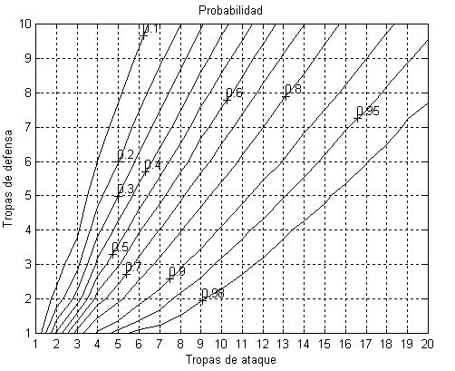 Probabilidad de vencer en un ataque en función del número de tropas del ejército atacante y el ejército defensor. La imagen ha sido generada con matlab mediante un algoritmo basado en el método de montecarlo. Esta imagen ha sido creada por --Arkady. Puede ser copiada y distribuida según lo recojido en la licencia GFDL